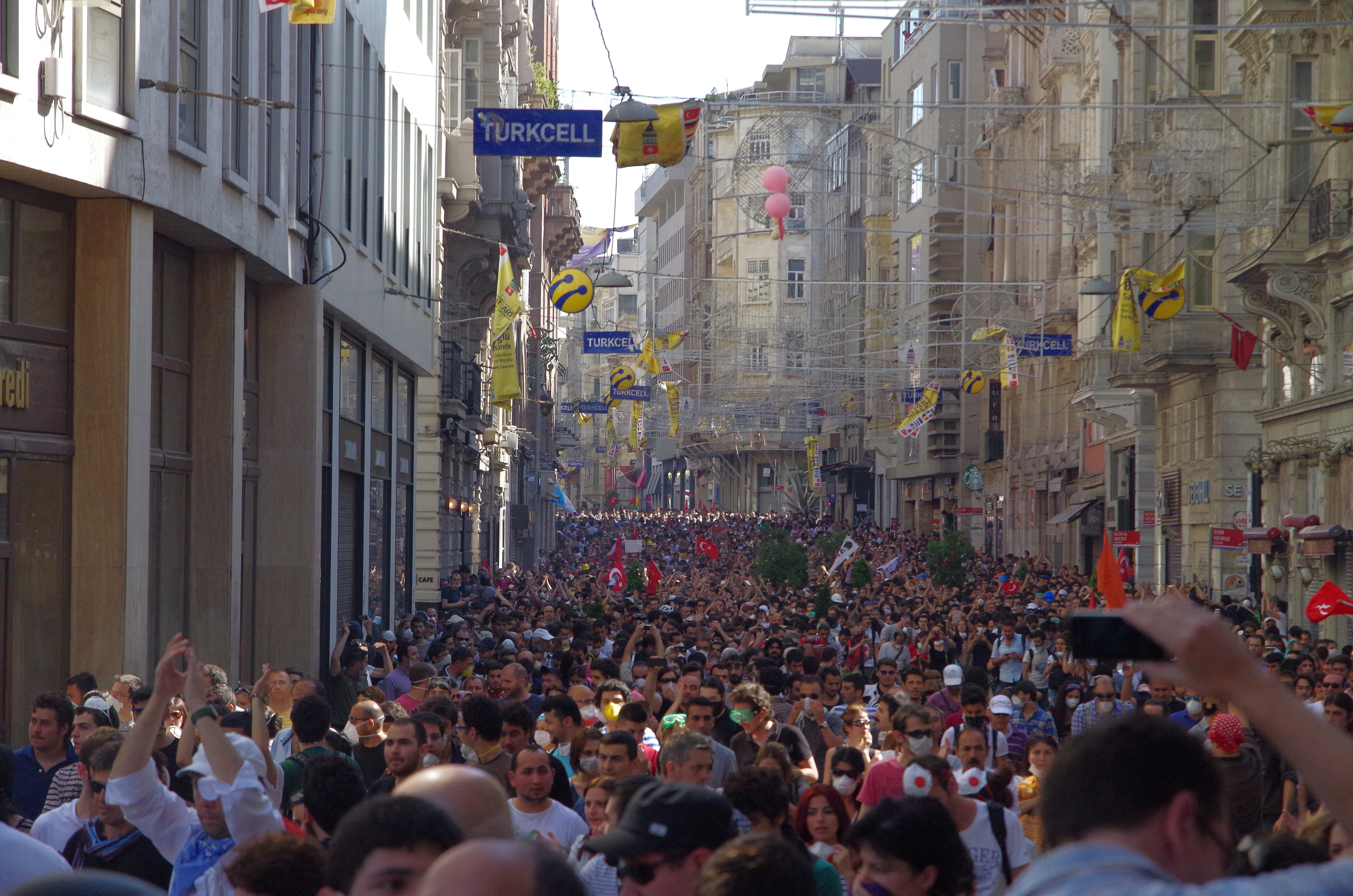 Taksim Square - Gezi Park Protests, İstanbul